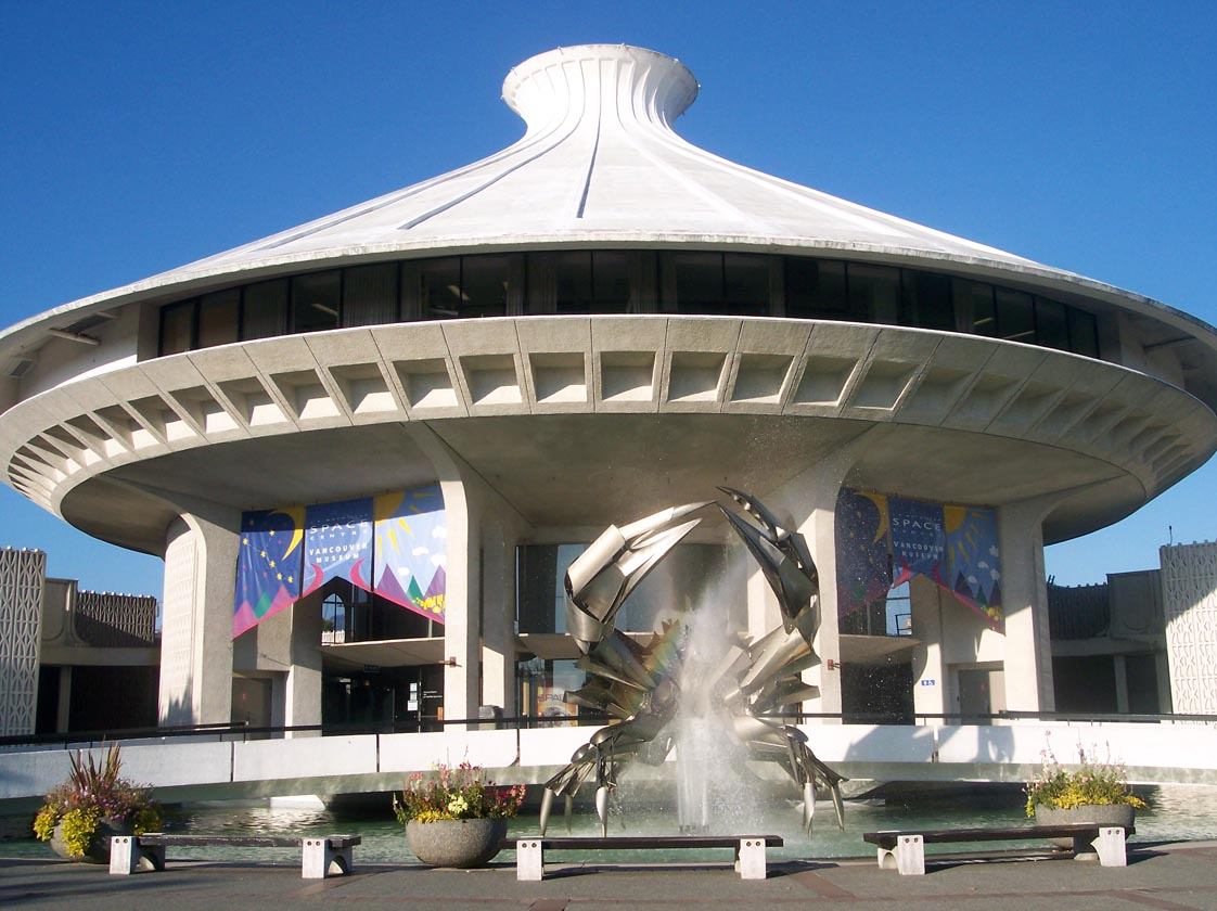 Vancouver Museum and Space Centre, Vancouver, BC, Canada